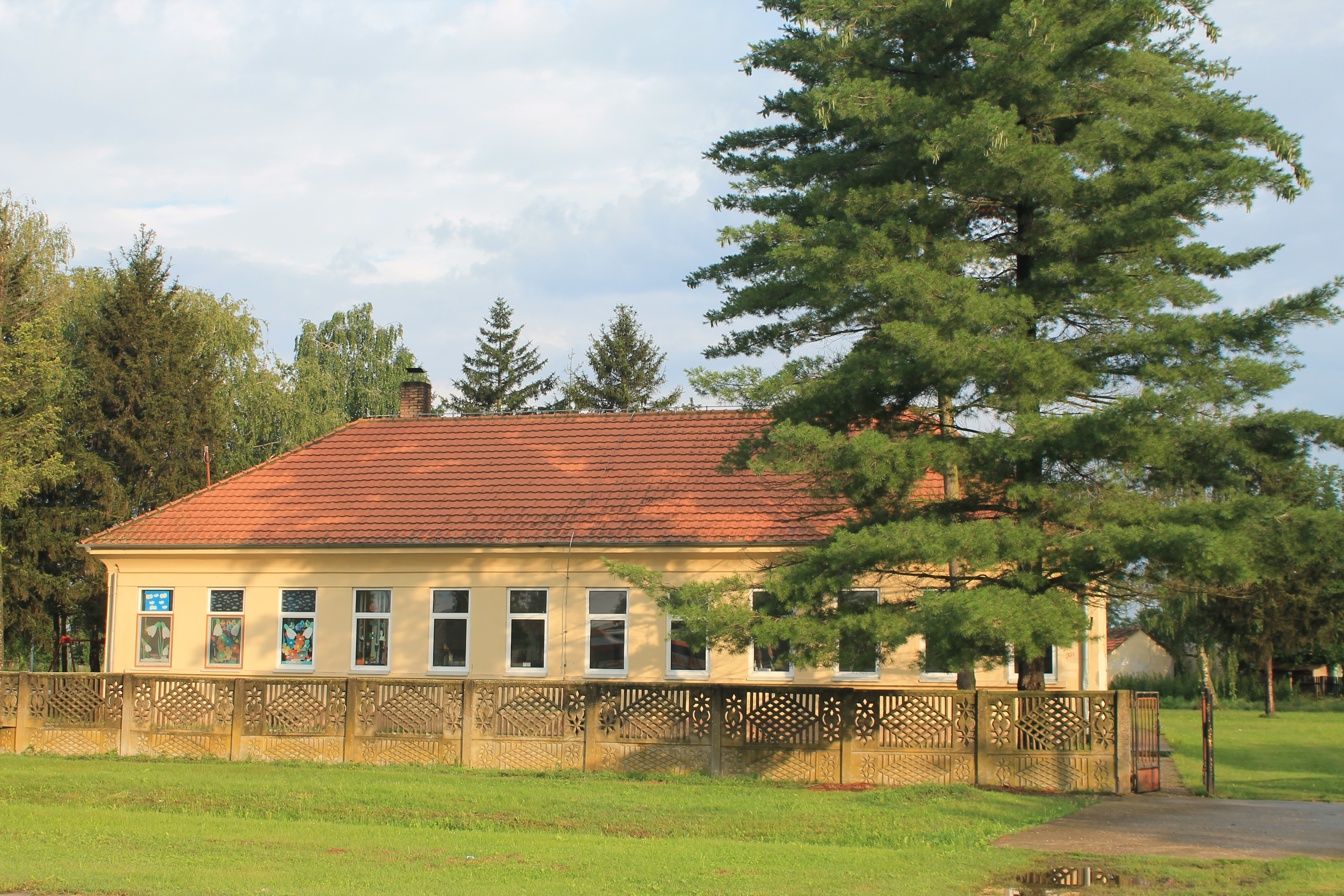 Sremska Rača